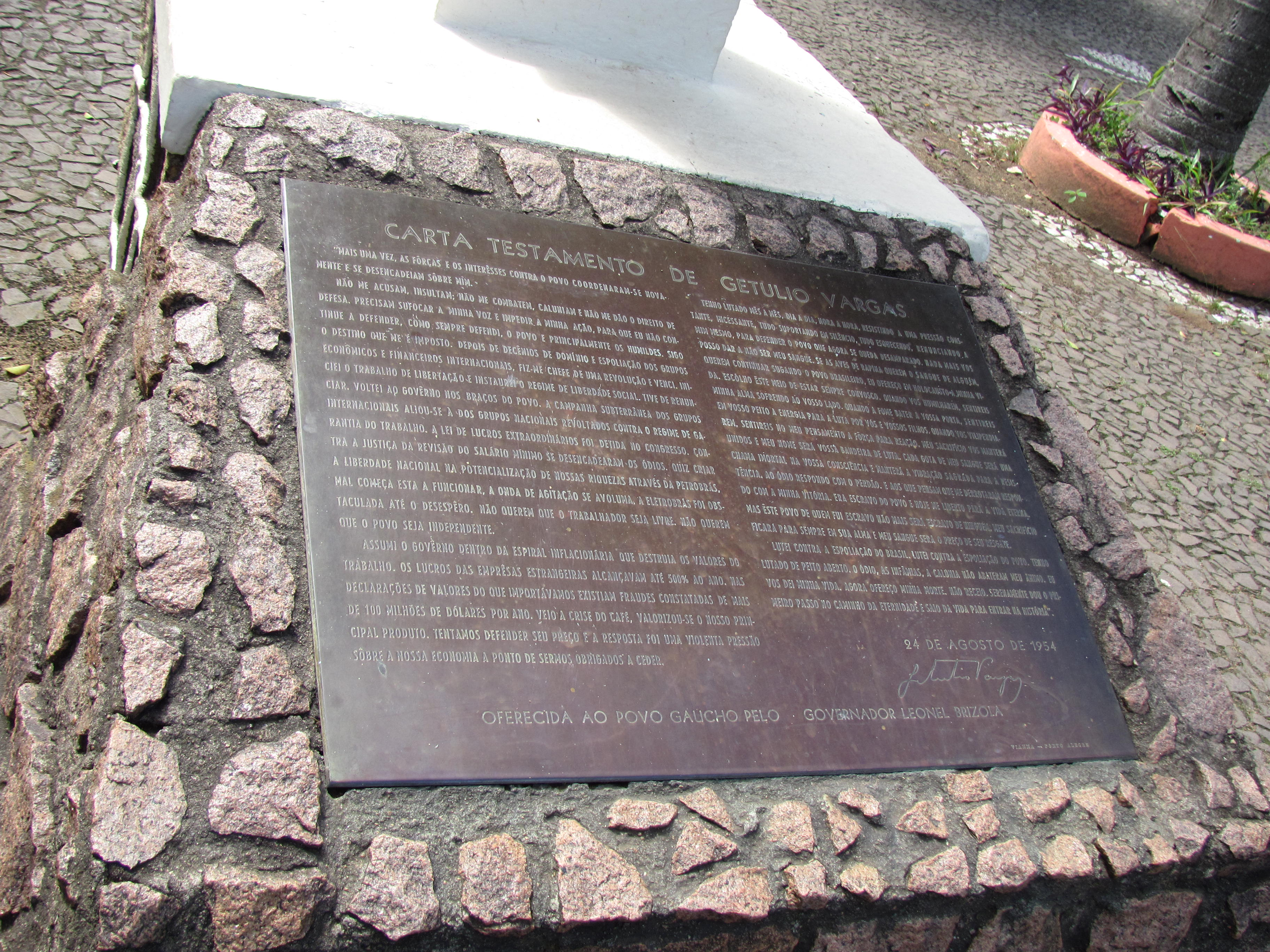 Praça Julio de Castilhos em São Jerônimo